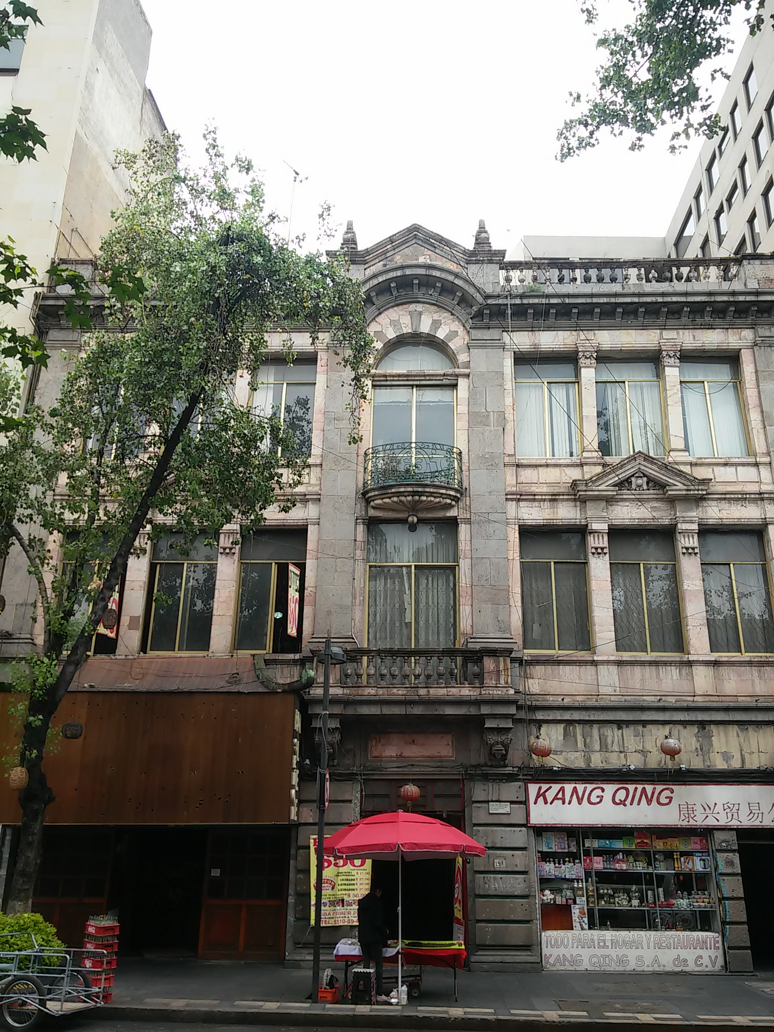 Edificio en la calle Independencia 19, en el centro histórico de la ciudad de México, construido por los ingenieros Alemanes Dorner y Bracmeister